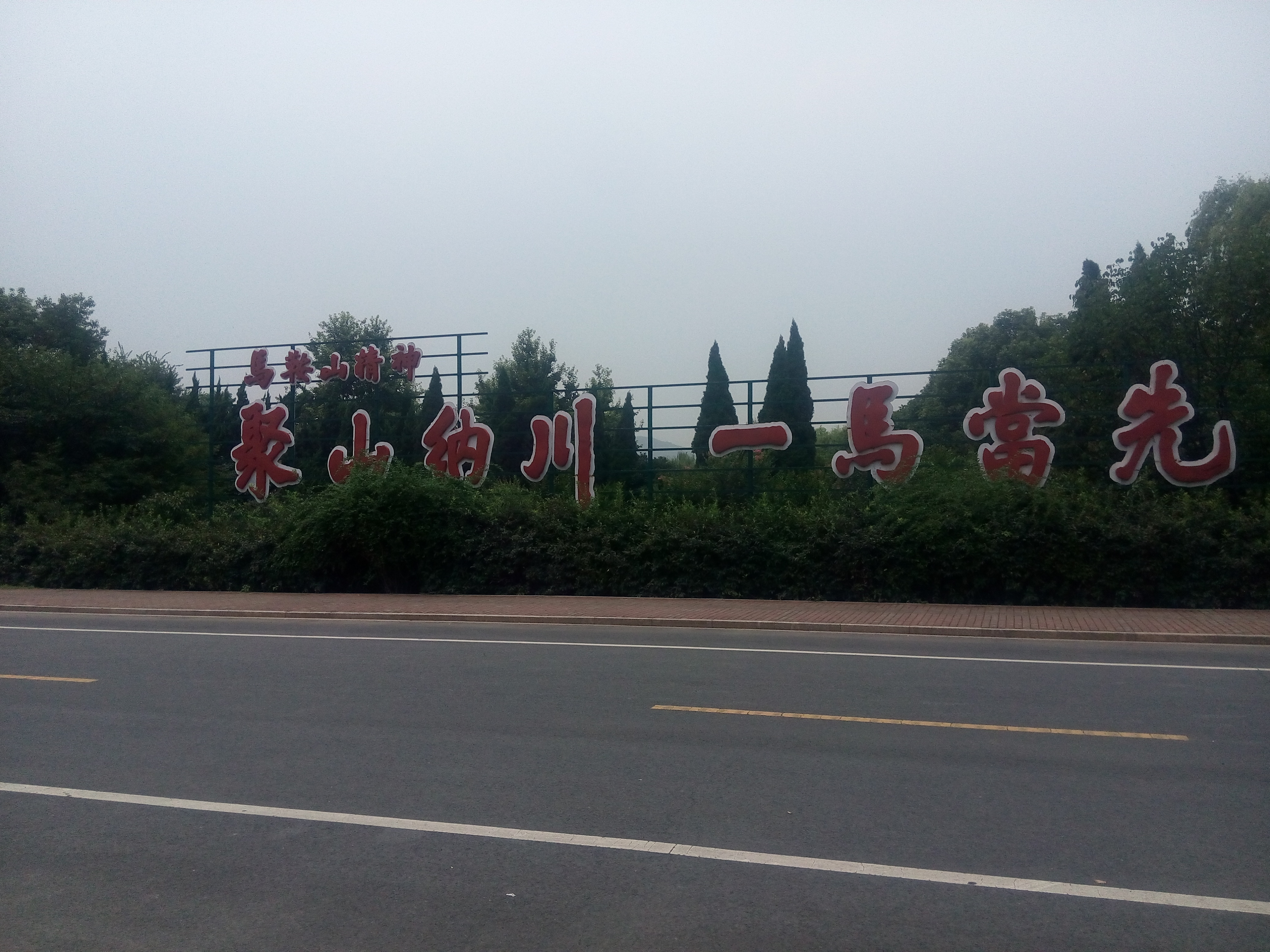 马鞍山的城市精神